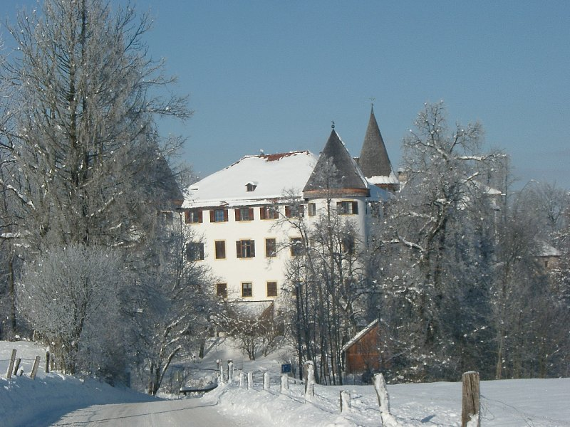 Schloss Reichersbeuern im Winter